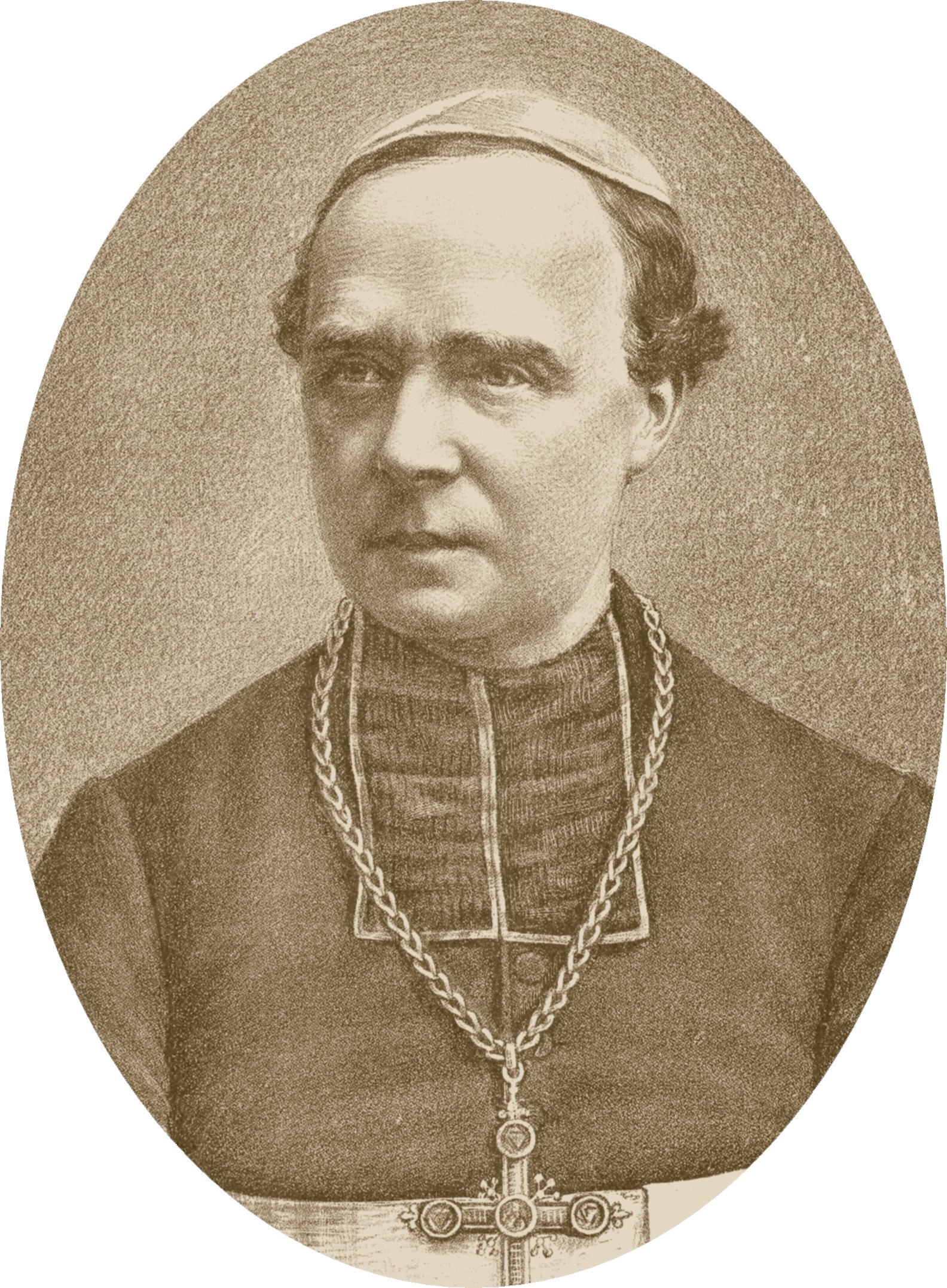 Georg Kardinal Kopp, Fürstbischof von Breslau